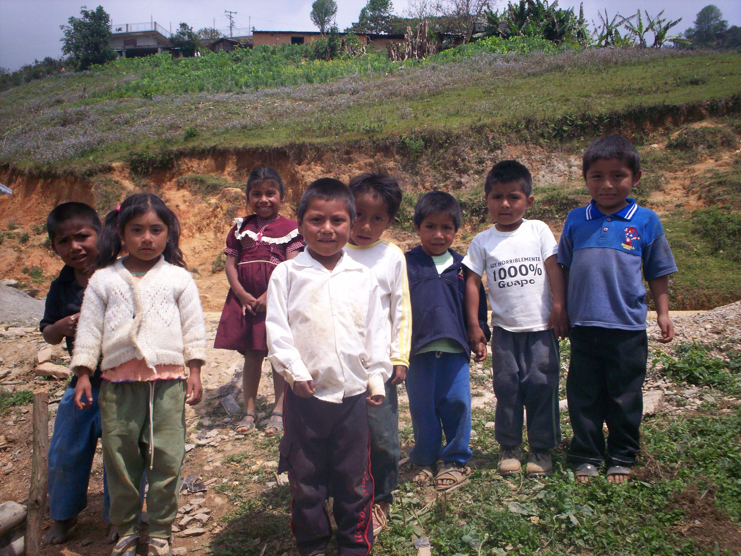 Estudiantes de la primaria de la comunidad de Agua Iglesia, municipio de Eloxochitlán de Flores Magón (Oaxaca, México).